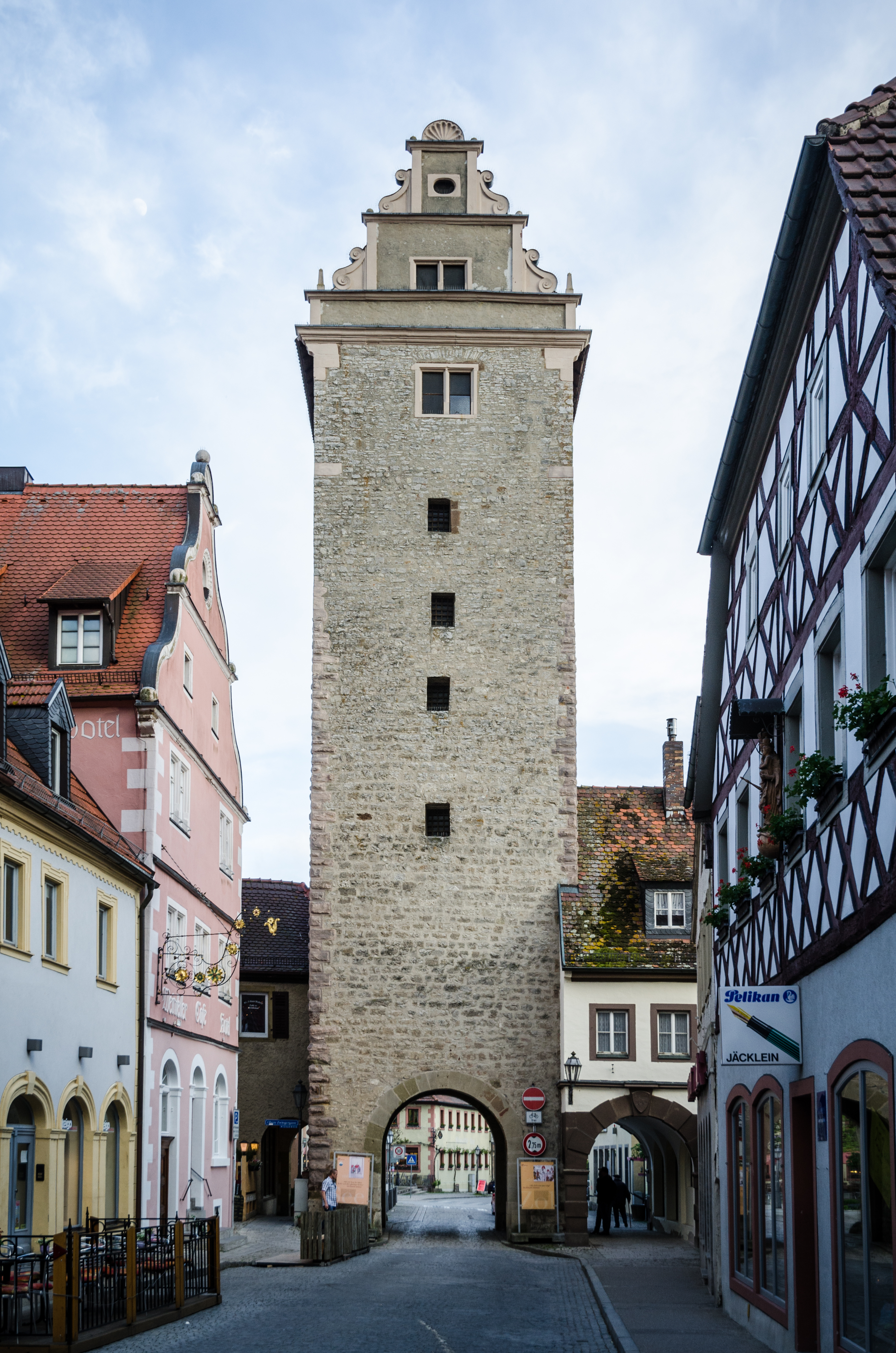 Volkach, Oberer Markt 1